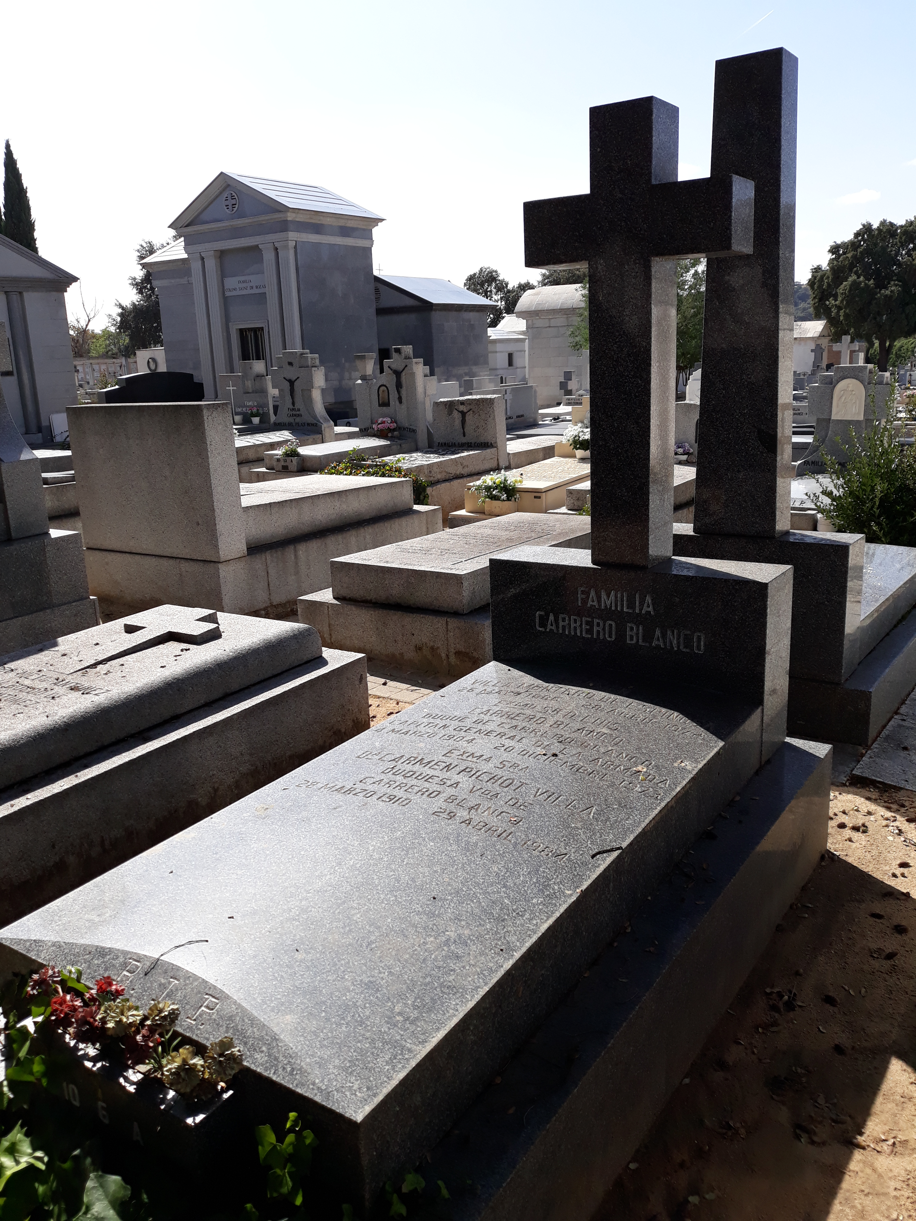 Das Familiengrab des spanischen Politikers und Offiziers Luis Carrero Blanco und seiner Ehefrau Carmen Pichot Villa auf dem Friedhof Mingorrubio in Madrid (Spanien).